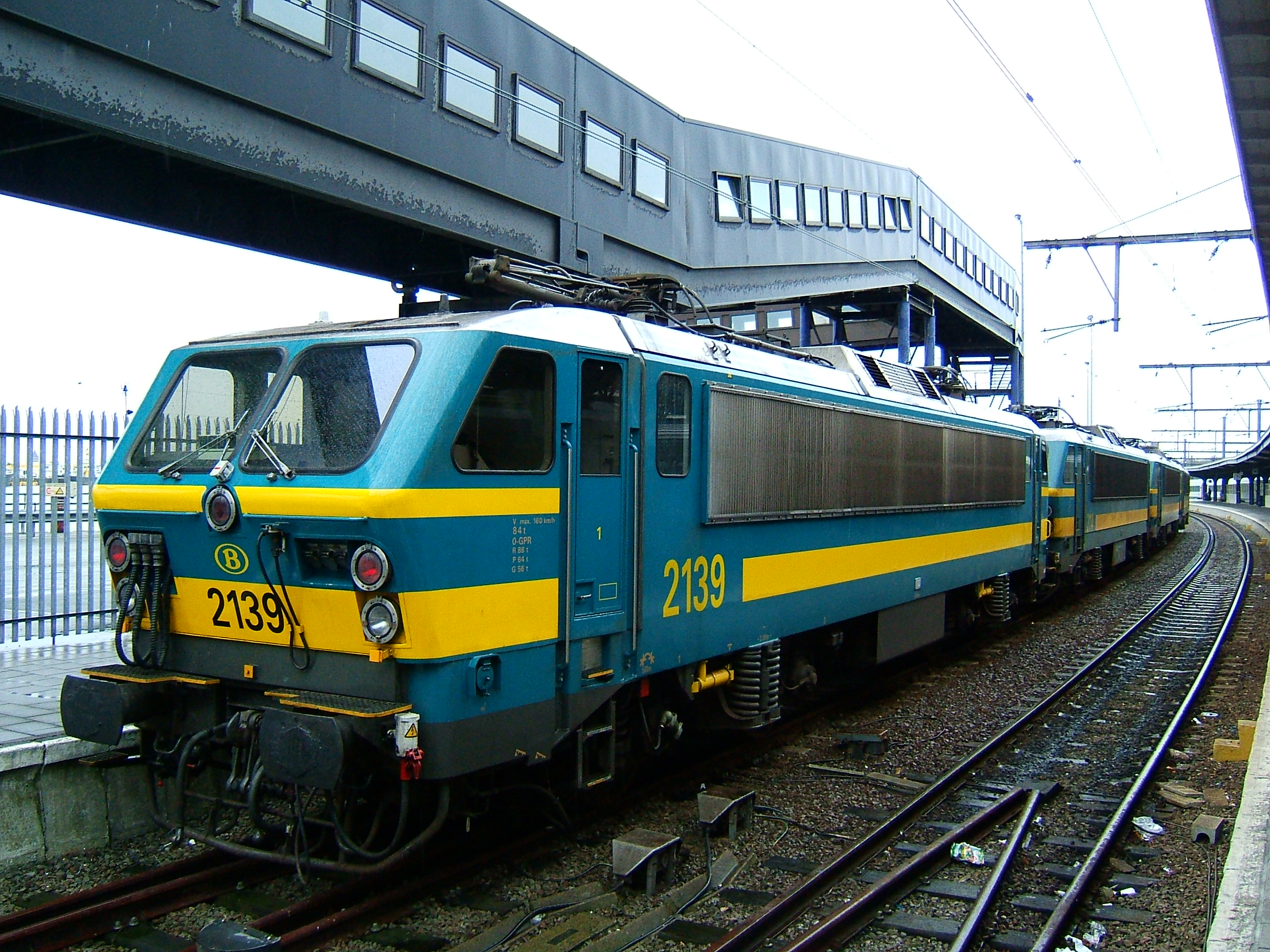 HLE 2139 in station Oostende